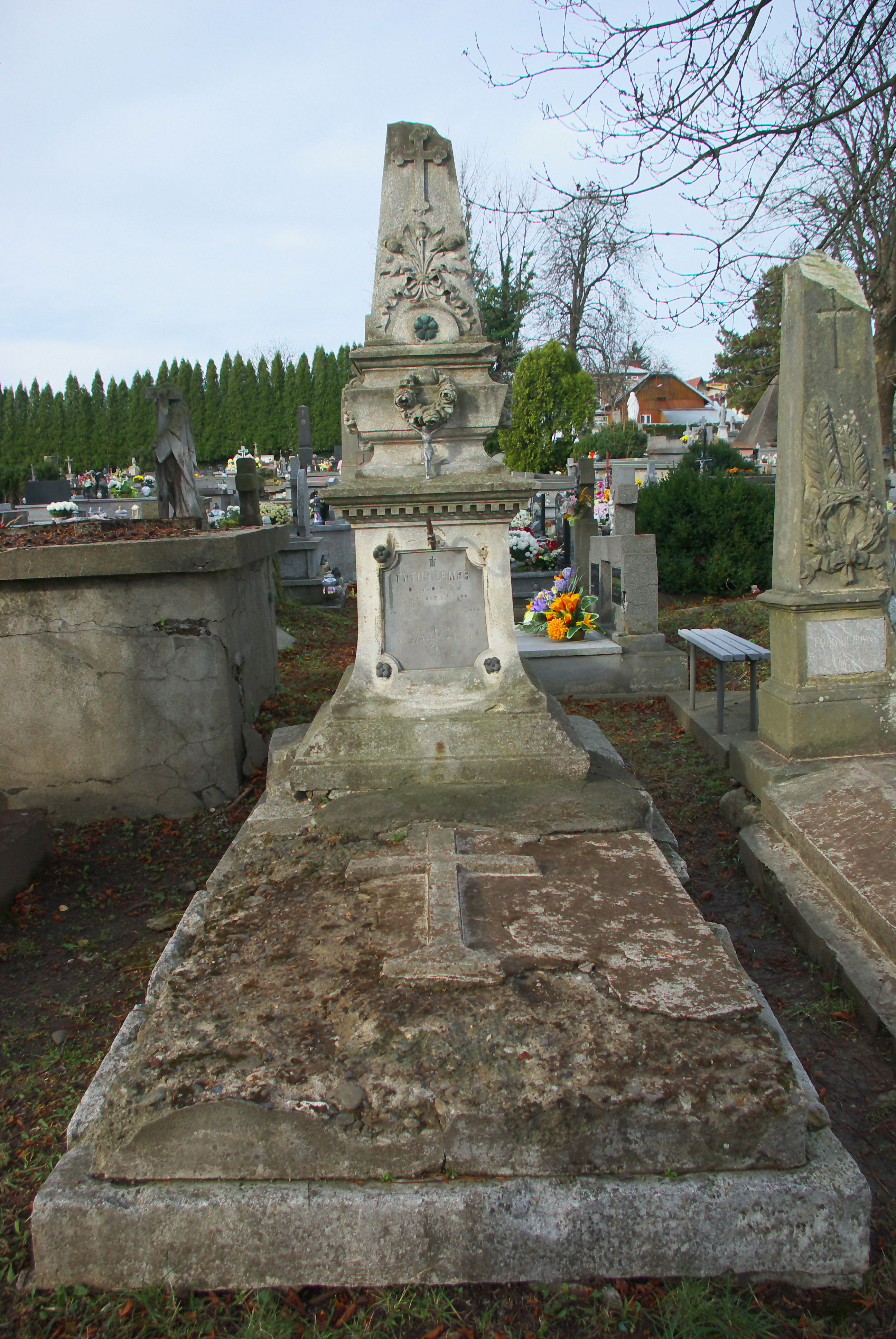 Nagrobek Tytusa Lemera na Cmentarzu Centralnym w Sanoku.